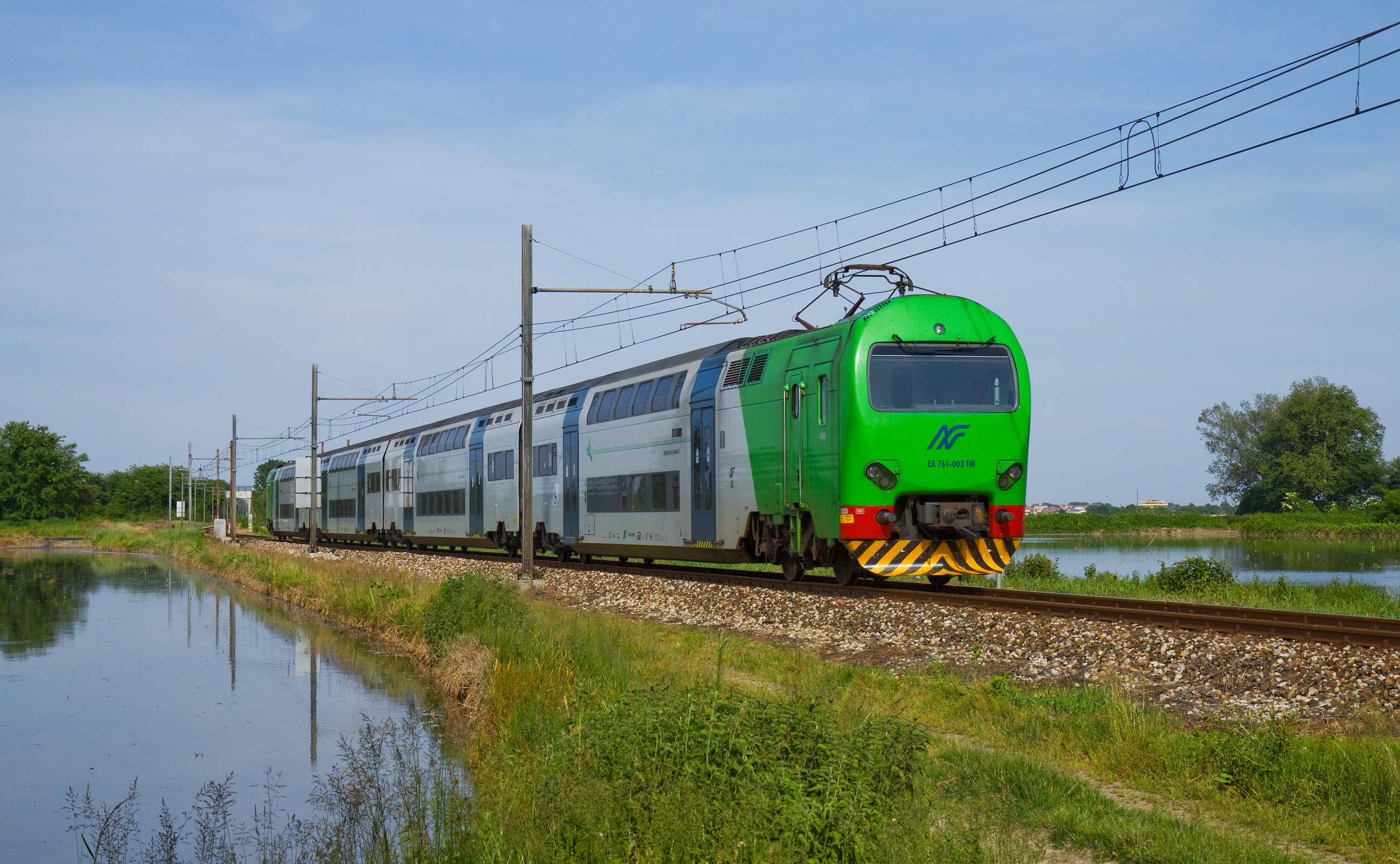 Treno Alta Frequentazione delle Ferrovie Nord Milano in corsa fra Novara e Galliate.